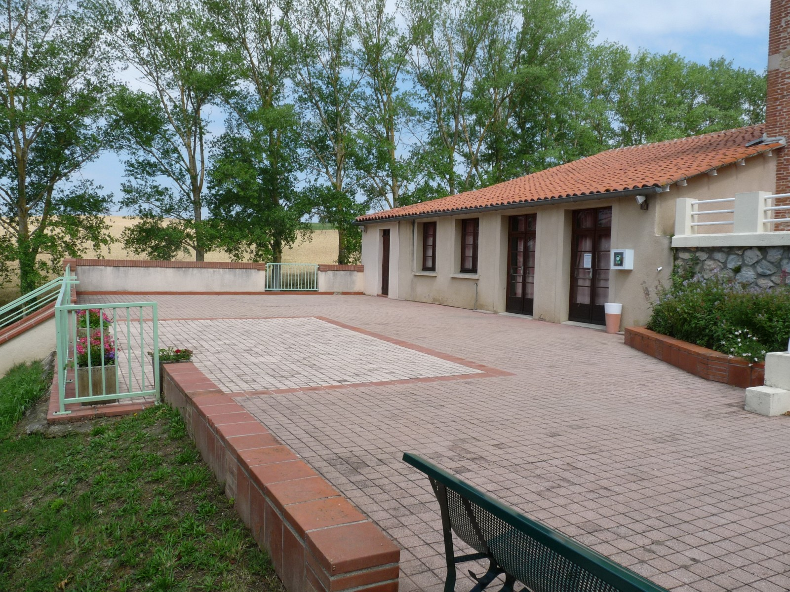 Salle des fêtes, Maureville, Haute-Garonne, France